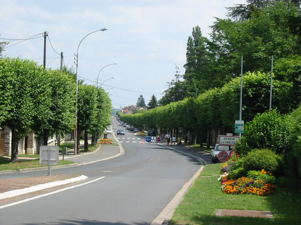 Veneux-les-Sablons, porte Nadon, le 3 juillet 2005.